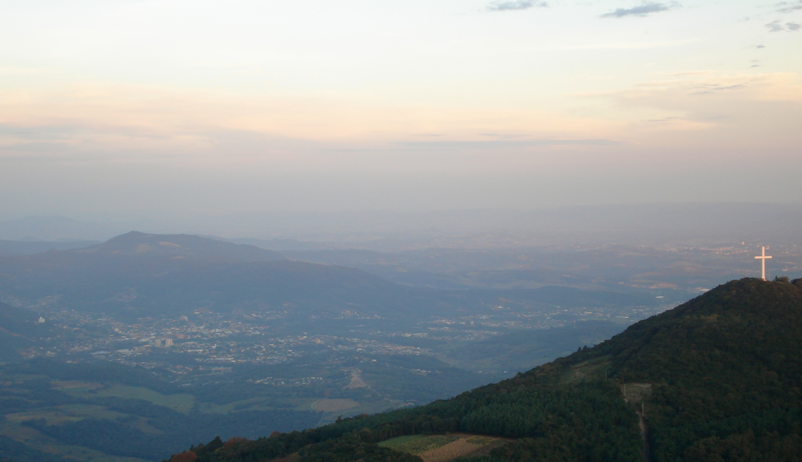 Monte da Fé (Morro da Cruz) em Igrejinha, Rio Grande do Sul, Brasil. Em segundo plano a cidade de Igrejinha.